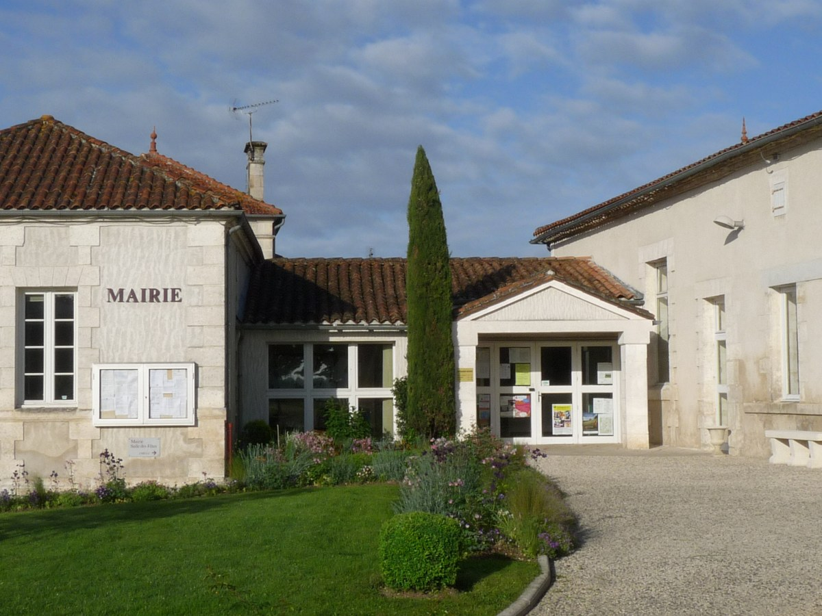 Mairie de Reignac, Charente, France